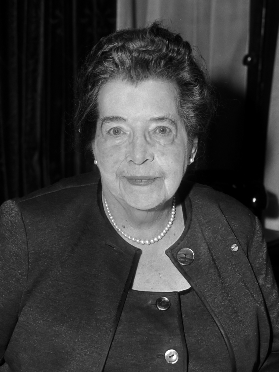 Een van de laatste "Amsterdamse Joffers", de schilderes Betsy Westendorp-Osieck hoopt op 29 december 1965 haar 85ste verjaardag te vieren. De schilderes in haar Amsterdamse woning met een van haar fraaie acquarellen 23 december 1965